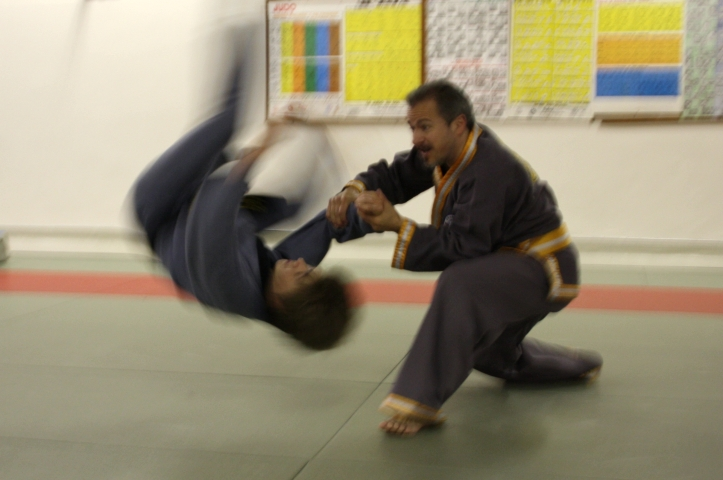 GM Nicolas TACCHI effectue ici une projection par torsion du poignet sur Gaetano TACCHI avec un genou au sol. On remarque bien ici le principe du cercle (WON) dans le Sin Moo Hapkido.